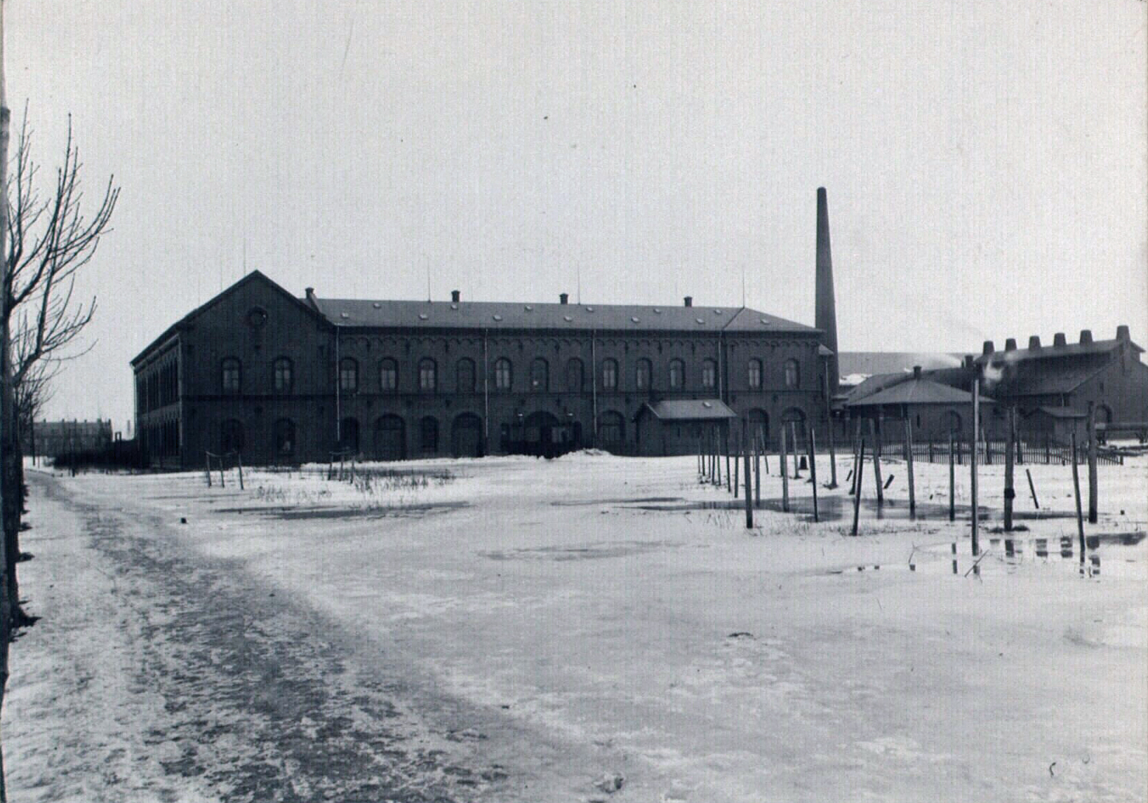 Hærens Geværfabrik på Ny Tøjhus står færdig, ca. 1888.